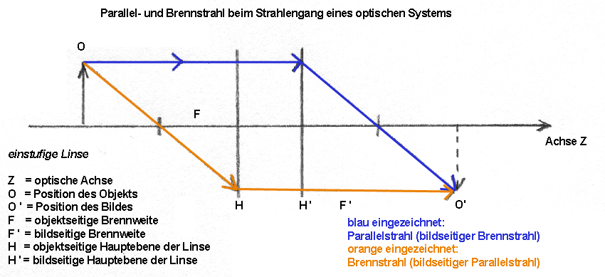 Anmerkungen zur Grafik: "Brennpunktstrahl" (siehe Artikel) und "Brennstrahl" (Grafik) meinen das Gleiche. Die optische Achse Z ist die Achse der Rotationssymmetrie Siehe zum Thema auch: Parallelstrahl Brennpunktstrahl Geometrische Optik :Kategorie:Geometrische Optik